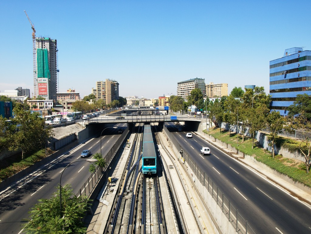 La Panamericana y la línea 2 del Metro de Santiago, vista desde el Puente Huérfanos.